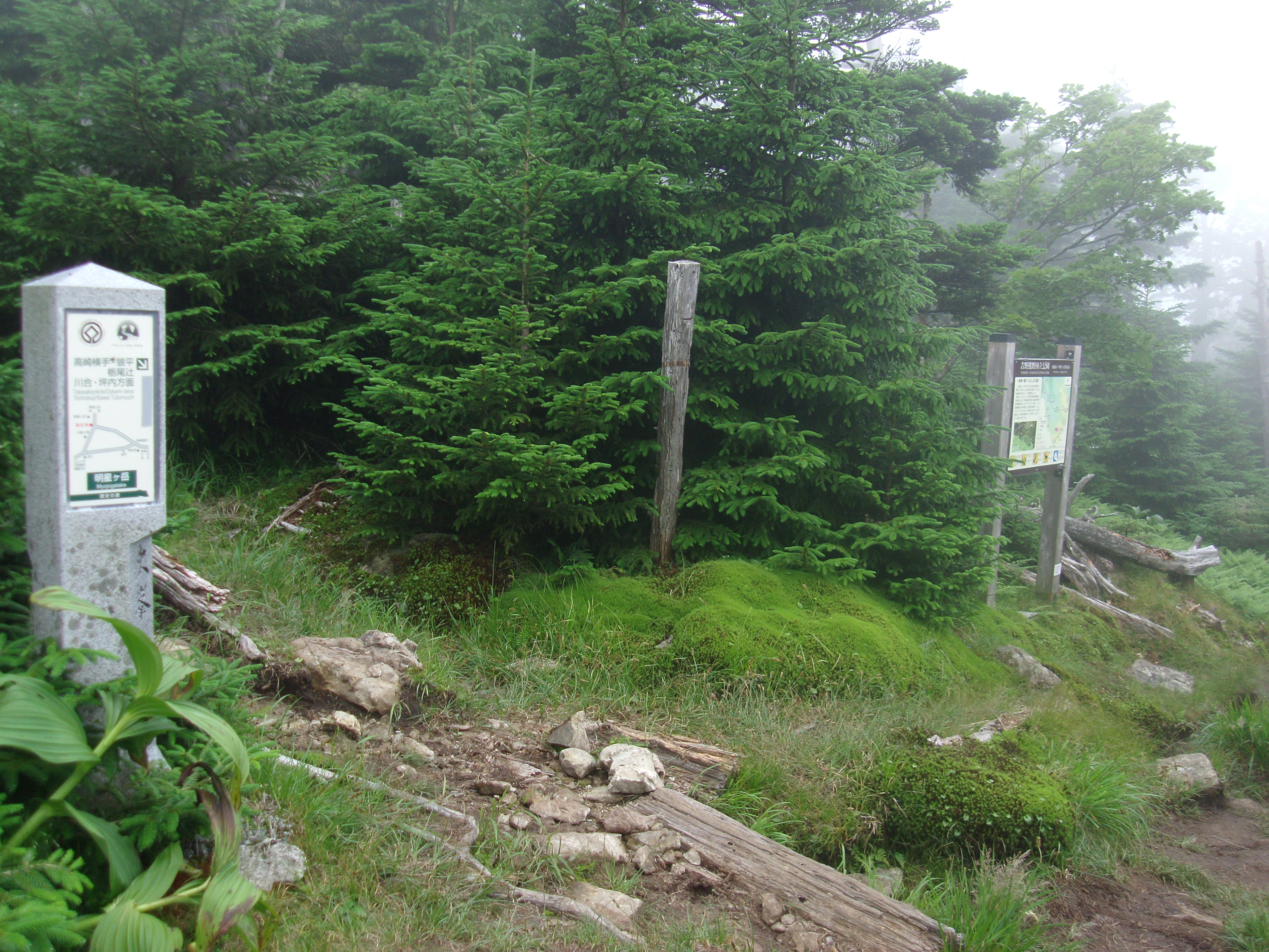 大峯奥駈道第50靡「明星ヶ岳」